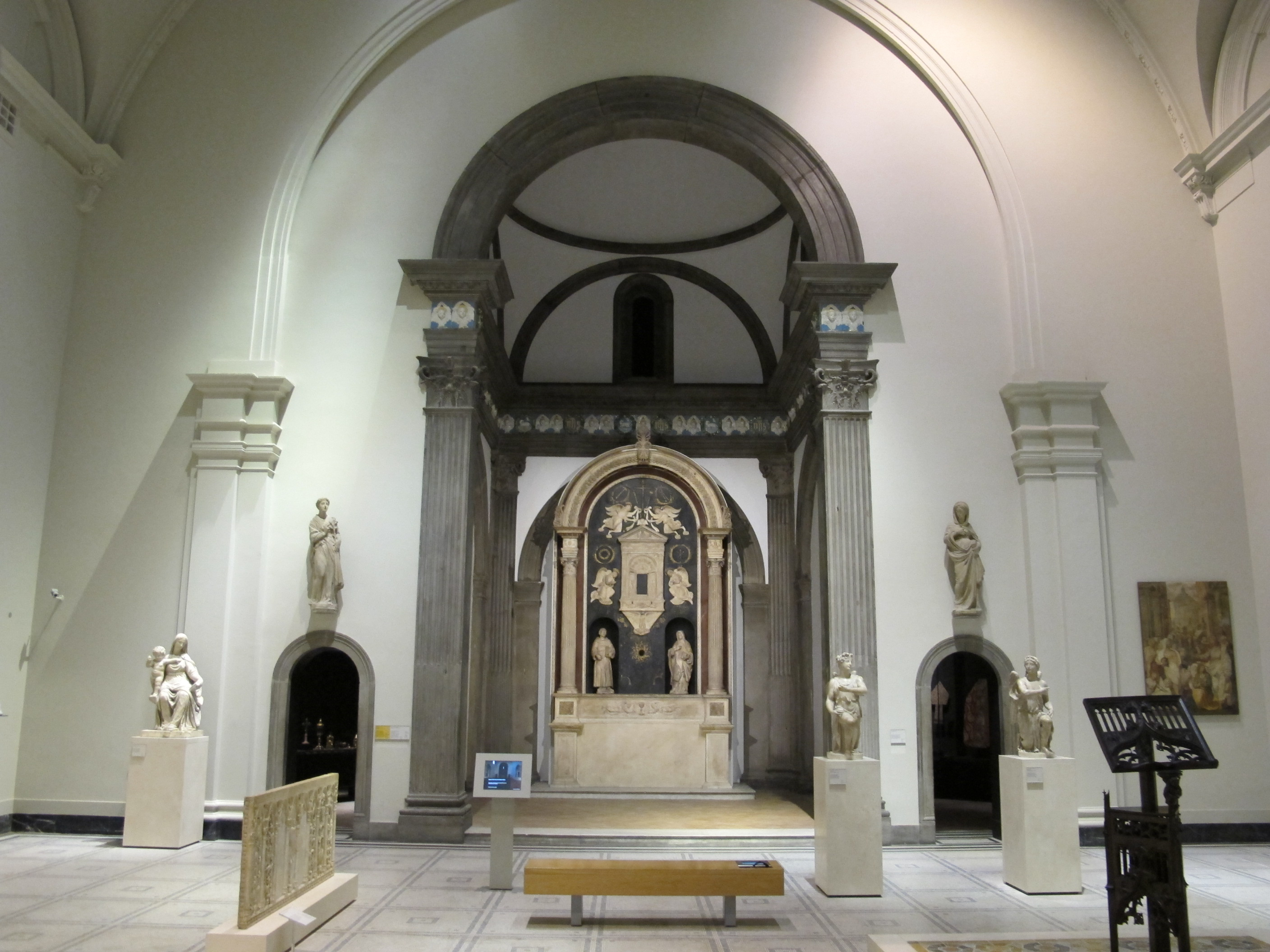 Giuliano da sangallo e bottega, scarsella di santa chiara, firenze, 1494-1500 ca.